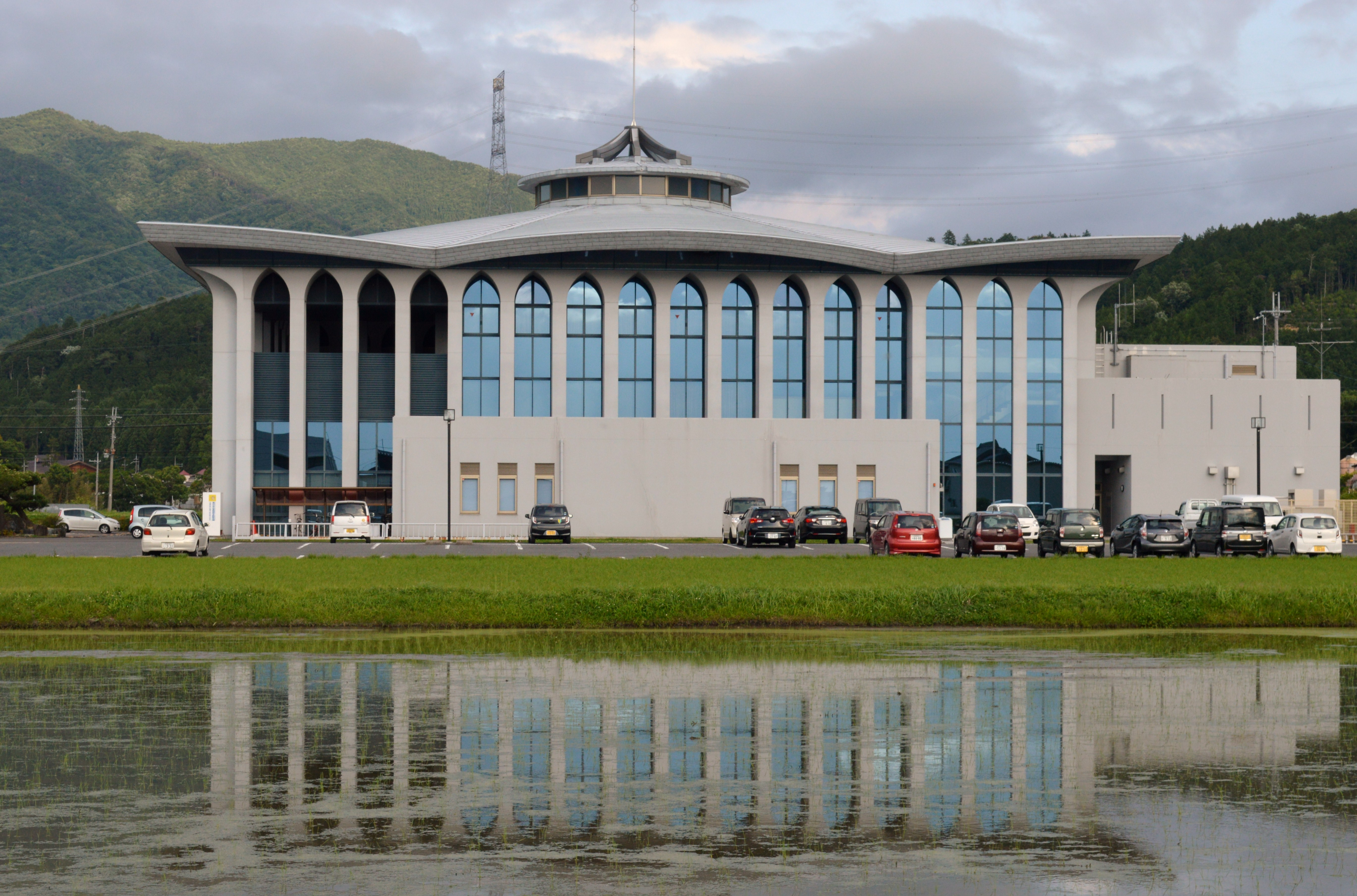 滋賀県東近江市の東近江市役所永源寺支所（永源寺コミュニティセンター）。